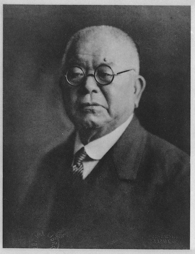 Portrait of Kitasato Shibasaburo (北里柴三郎, 1853 – 1931)